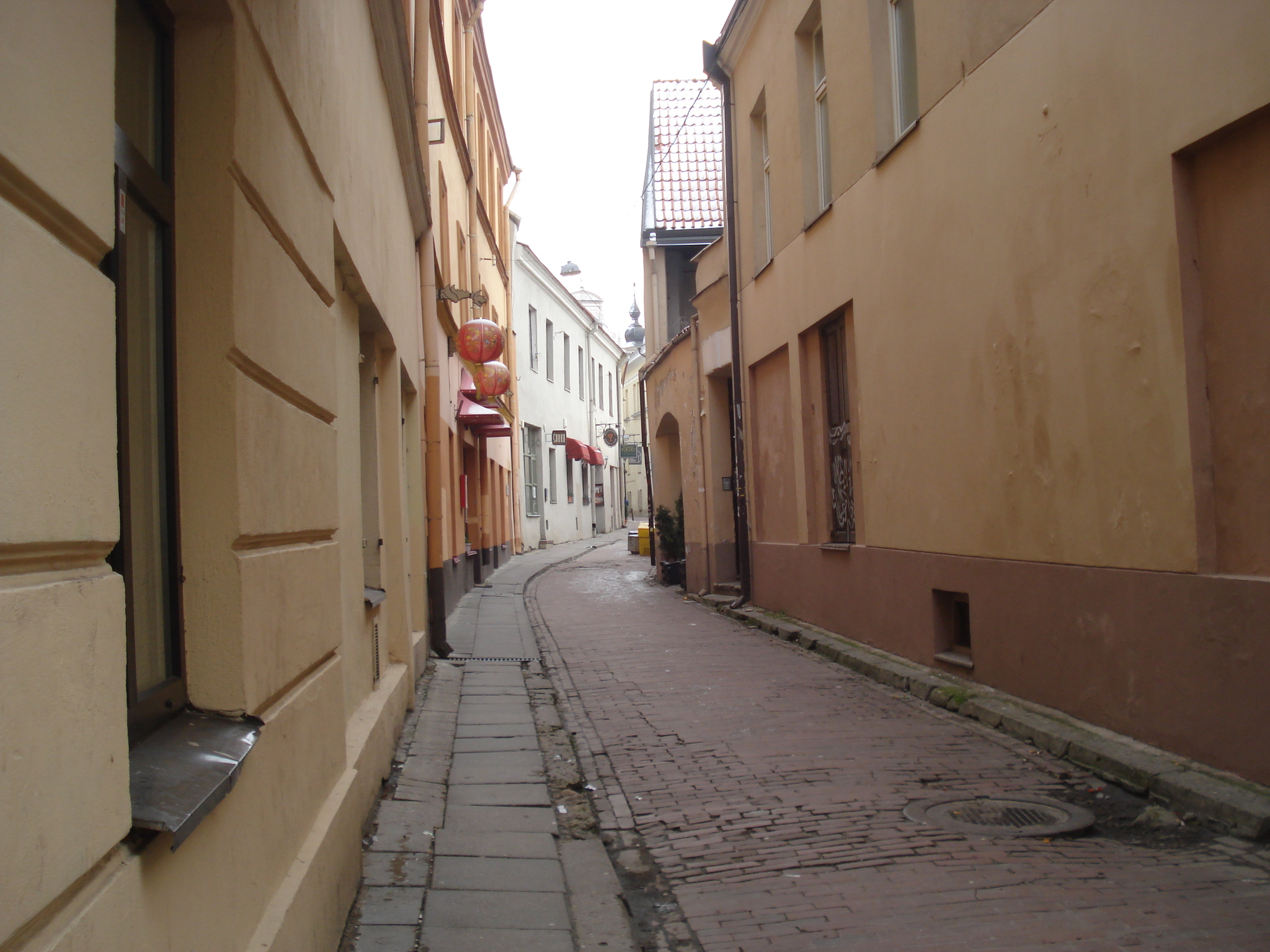 Улица Швянто Миколо (Вильнюс)